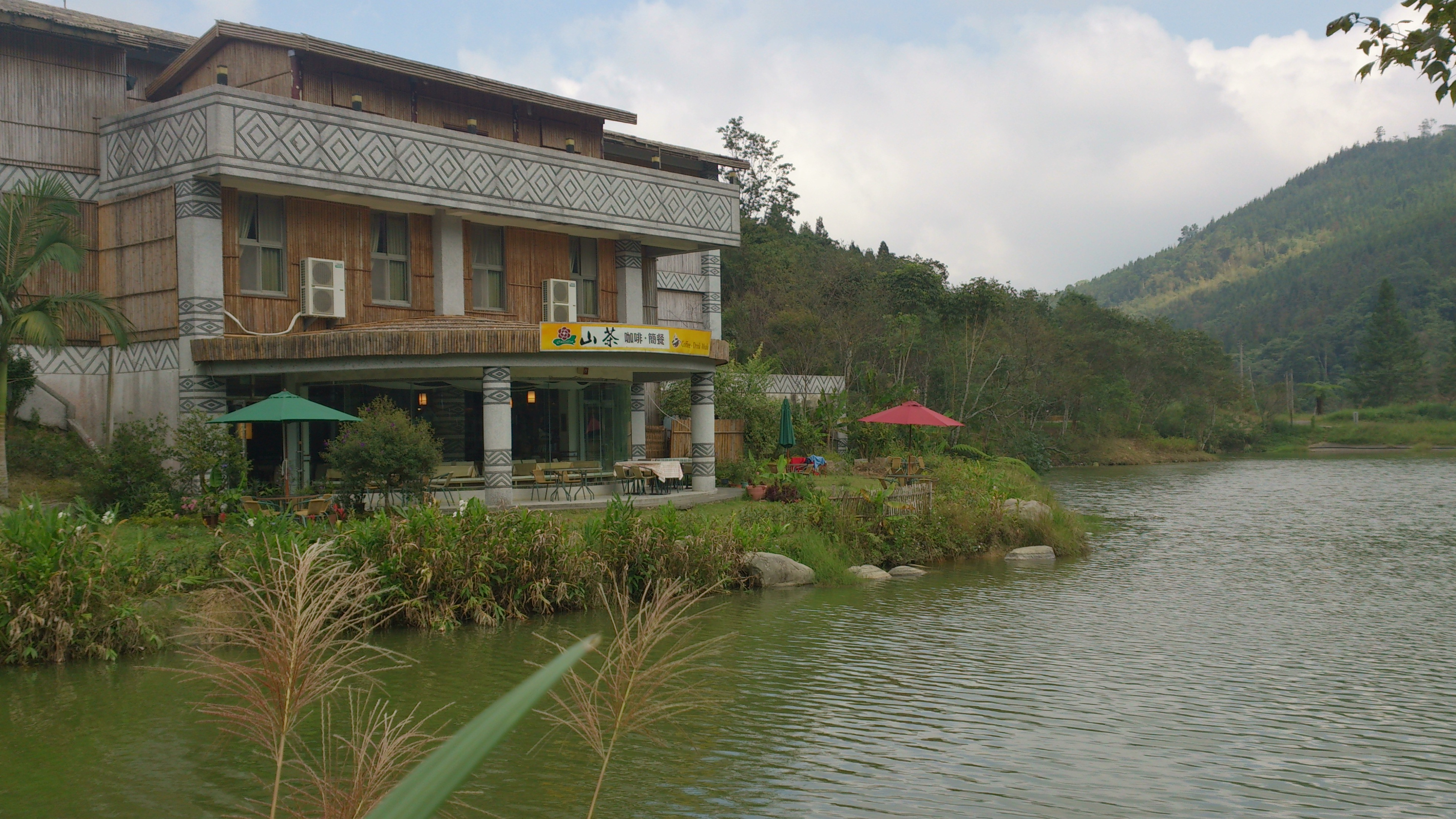 賽夏文物館 Saisiyat Folklore Museum